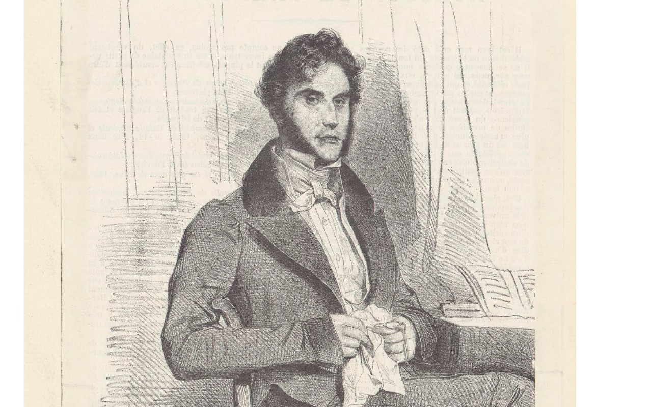 Dessin d'Ajasson de Gransange